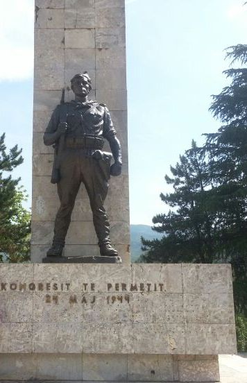 "Kongresit te Permetit 24 Maj 1944"